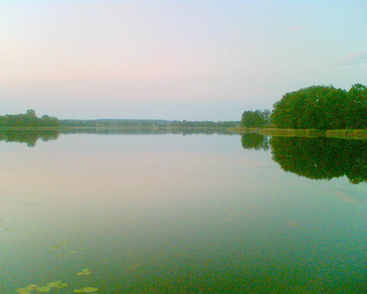 Lake Gaveikiai in Lithuania